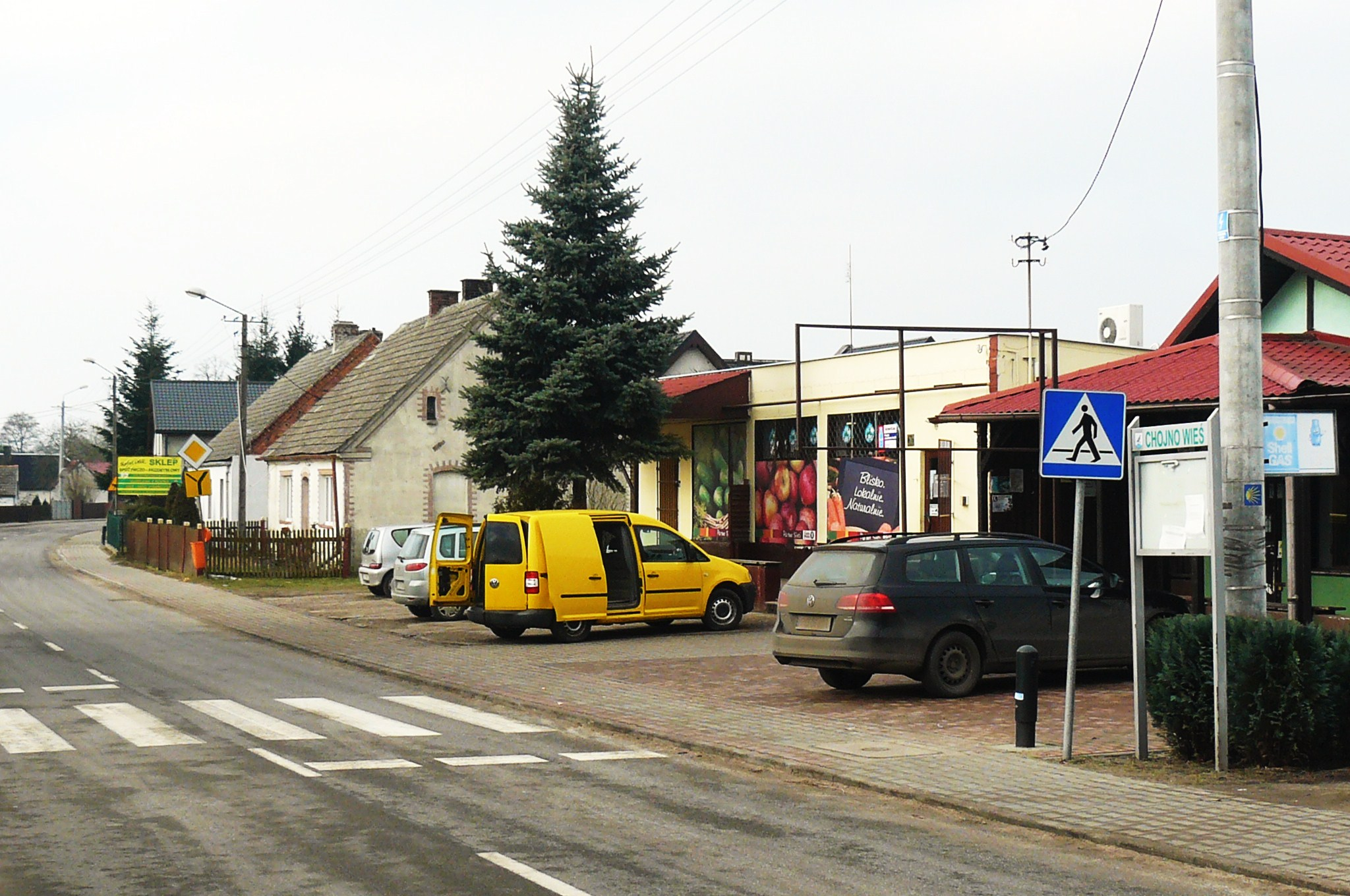 Chojno-Wieś. Widok z centrum miejscowości.